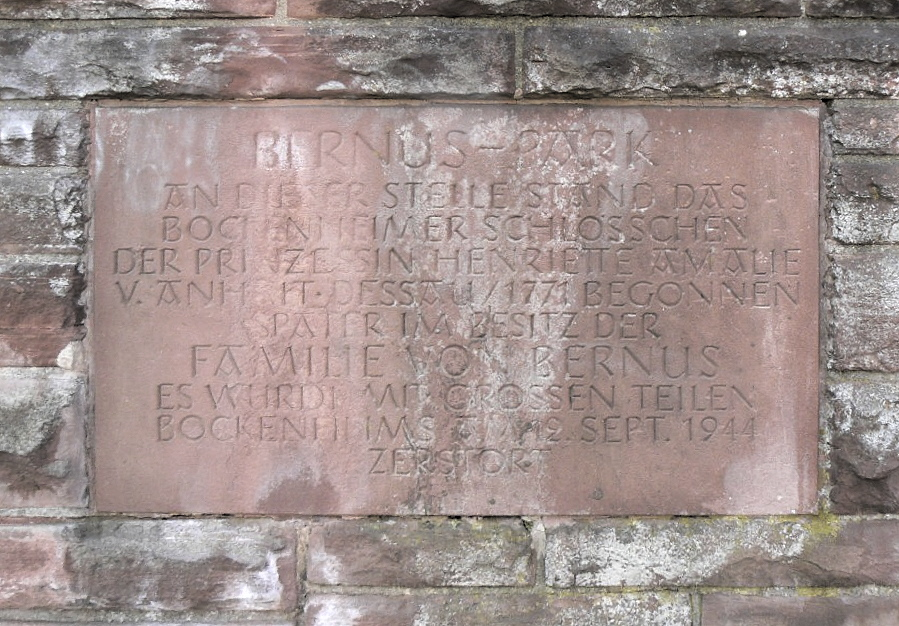 Frankfurt am Main, Stadtteil Bockenheim: Von-Bernus-Park, Parkeingang an der Schloßstraße, Gedenktafel an das Bockenheimer Schlösschen von 1771, zerstört am 12.09.1944 beim Bombenangriff auf Bockenheim.Inschrift der Tafel aus Rotem Mainsandstein (im Original in Versalien; Interpunktion hinzugefügt): Bernus-Park — An dieser Stelle stand das Bockenheimer Schlösschen der Prinzessin Henriette Amalie v. Anhalt-Dessau / 1771 begonnen, später im Besitz der Familie von Bernus. Es wurde mit grossen Teilen Bockenheims am 12. Sept. 1944 zerstört.